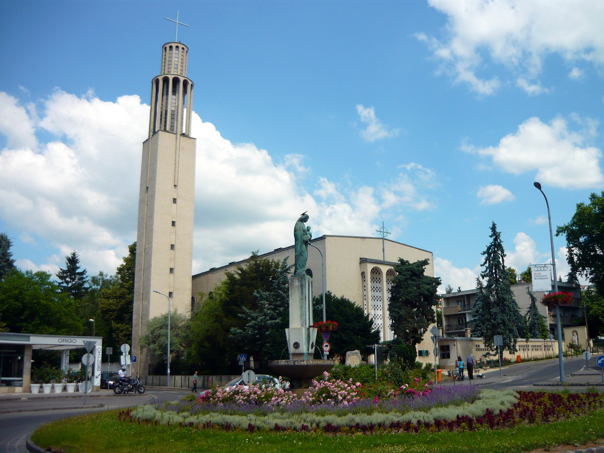 Pasaréti téri templom, Pasaréti tér, Budapest